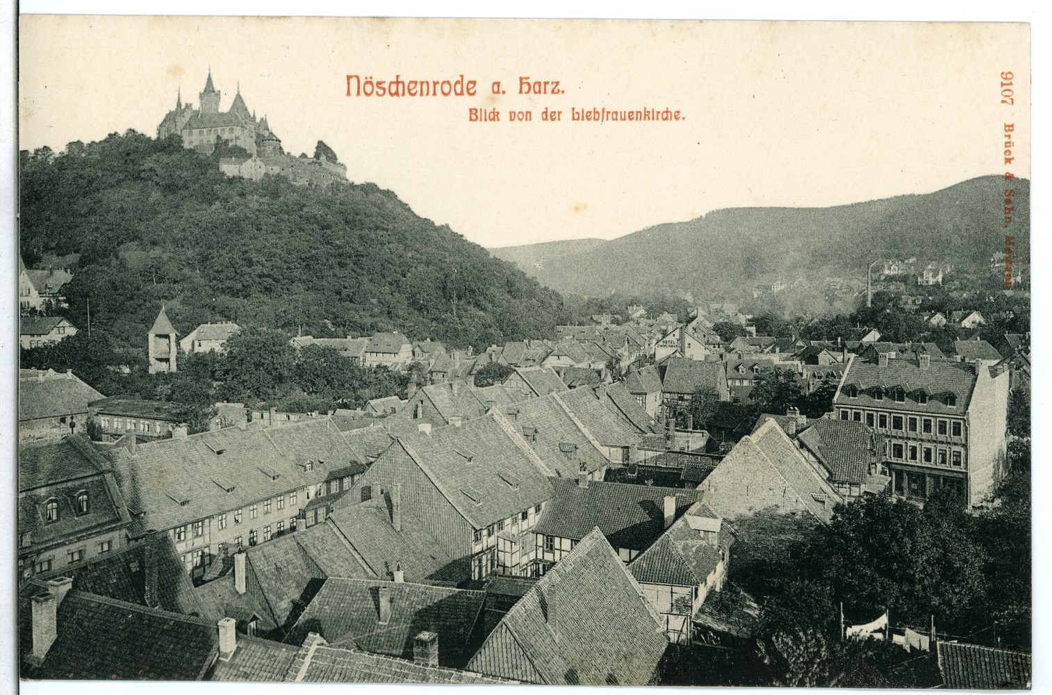 Nöschenrode; Blick von der Liebfrauenkirche This postcard is from publisher Brück & Sohn in Meißen ( This postcard has a unique number 09107 and is available in a higher resolution at the publisher. This images was uploaded in a cooperation project between Wikipedians and the publisher.